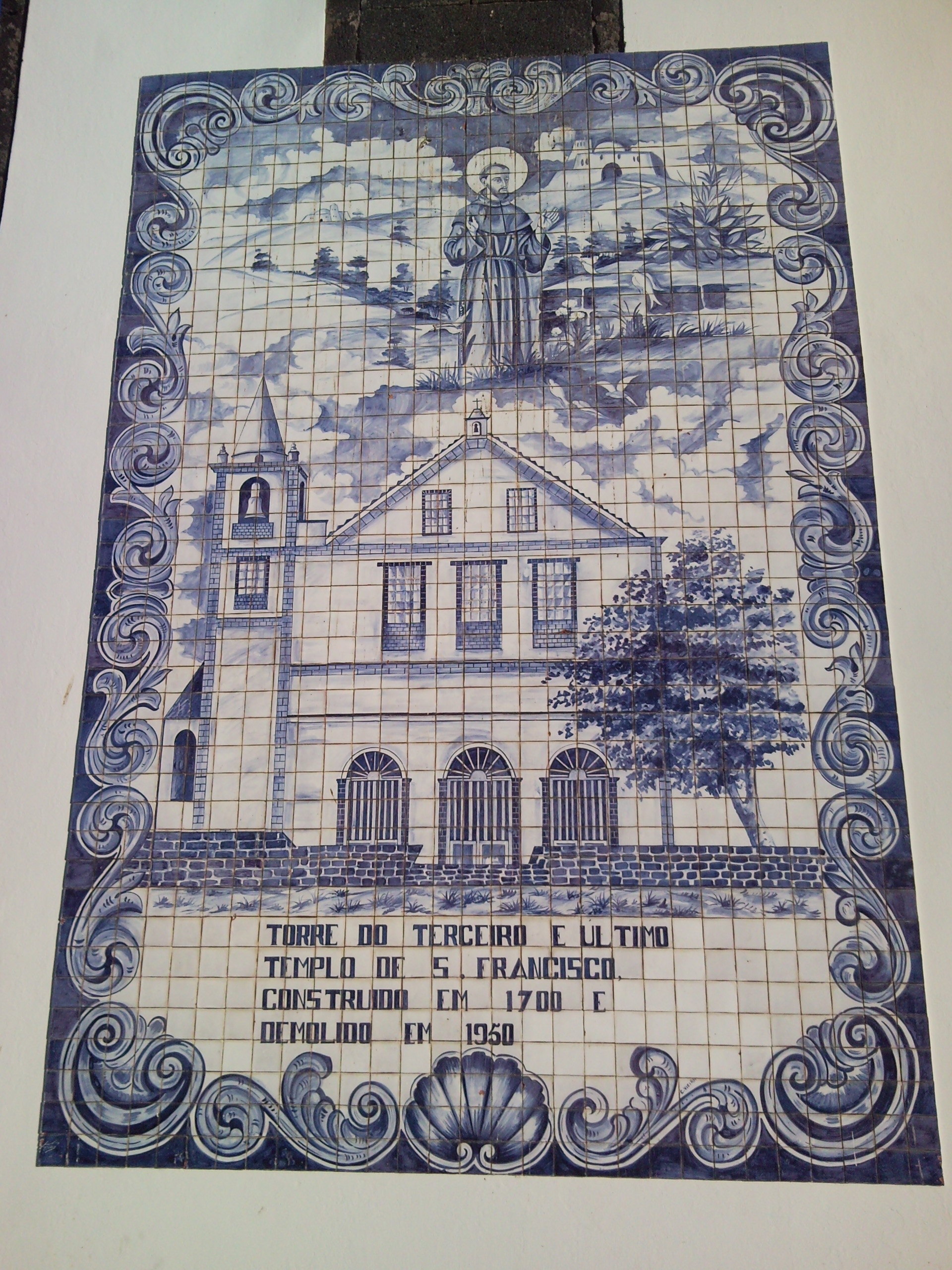 Azulejo - Torre da Igreja de Nossa Senhora dos Anjos, (S. Francisco). Portugal, Açores, Ilha Graciosa, (ant. distrito de Angra do Heroismo), Santa Cruz da Graciosa.